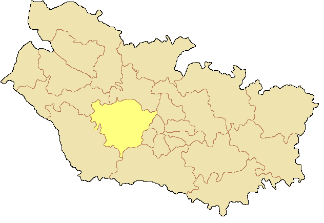 Canton d'Ailly-sur-Somme dans le département de la Somme